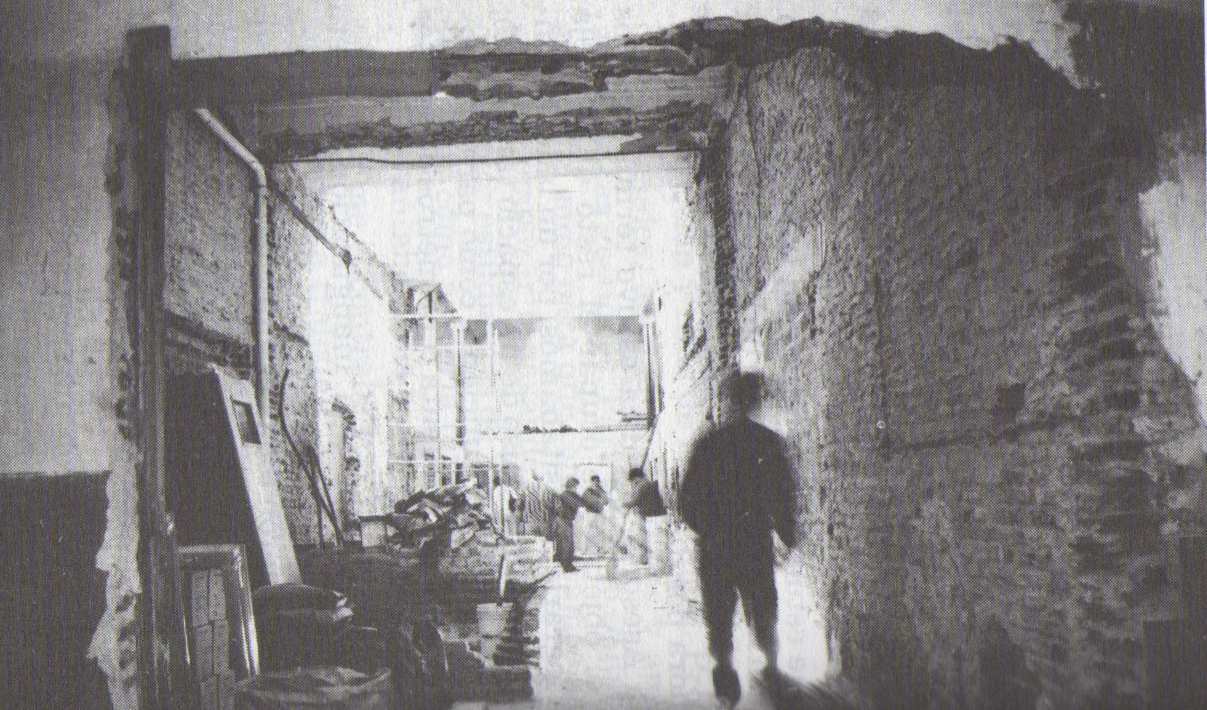 Remodelación para el Centro Universitario Devoto, penal de Devoto, Argentina.